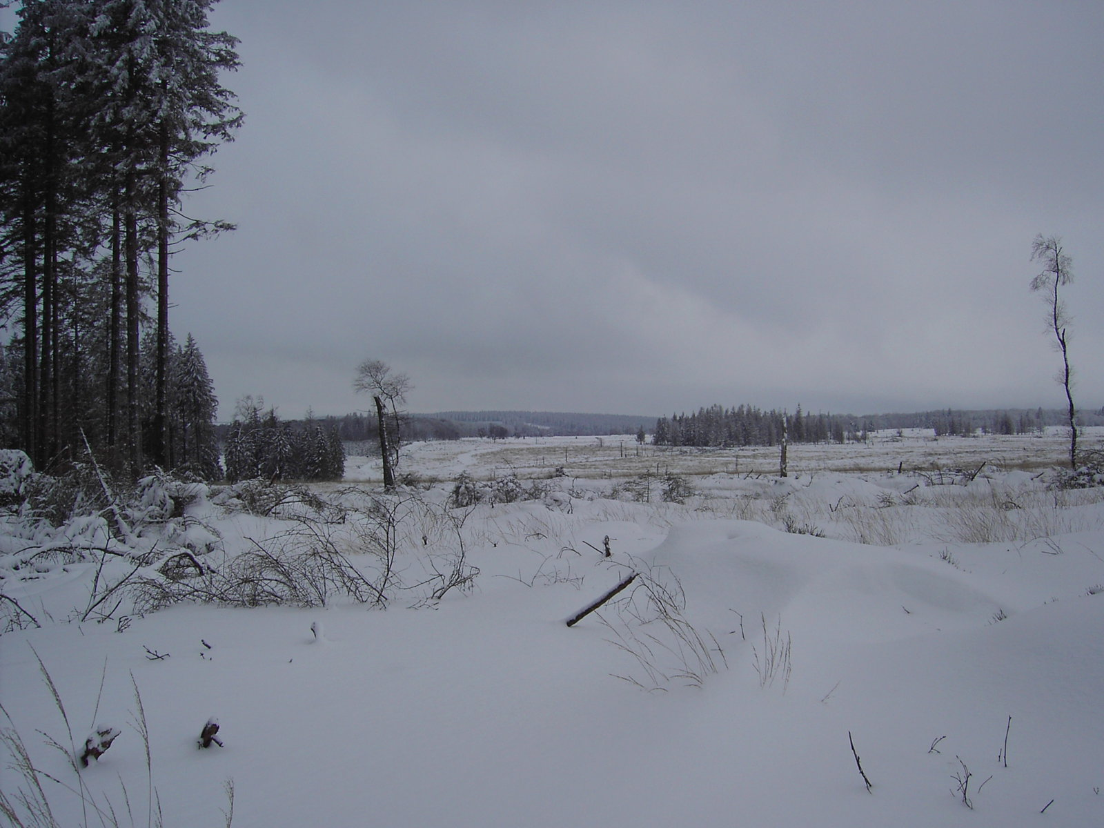 Geitzbusch im Winter